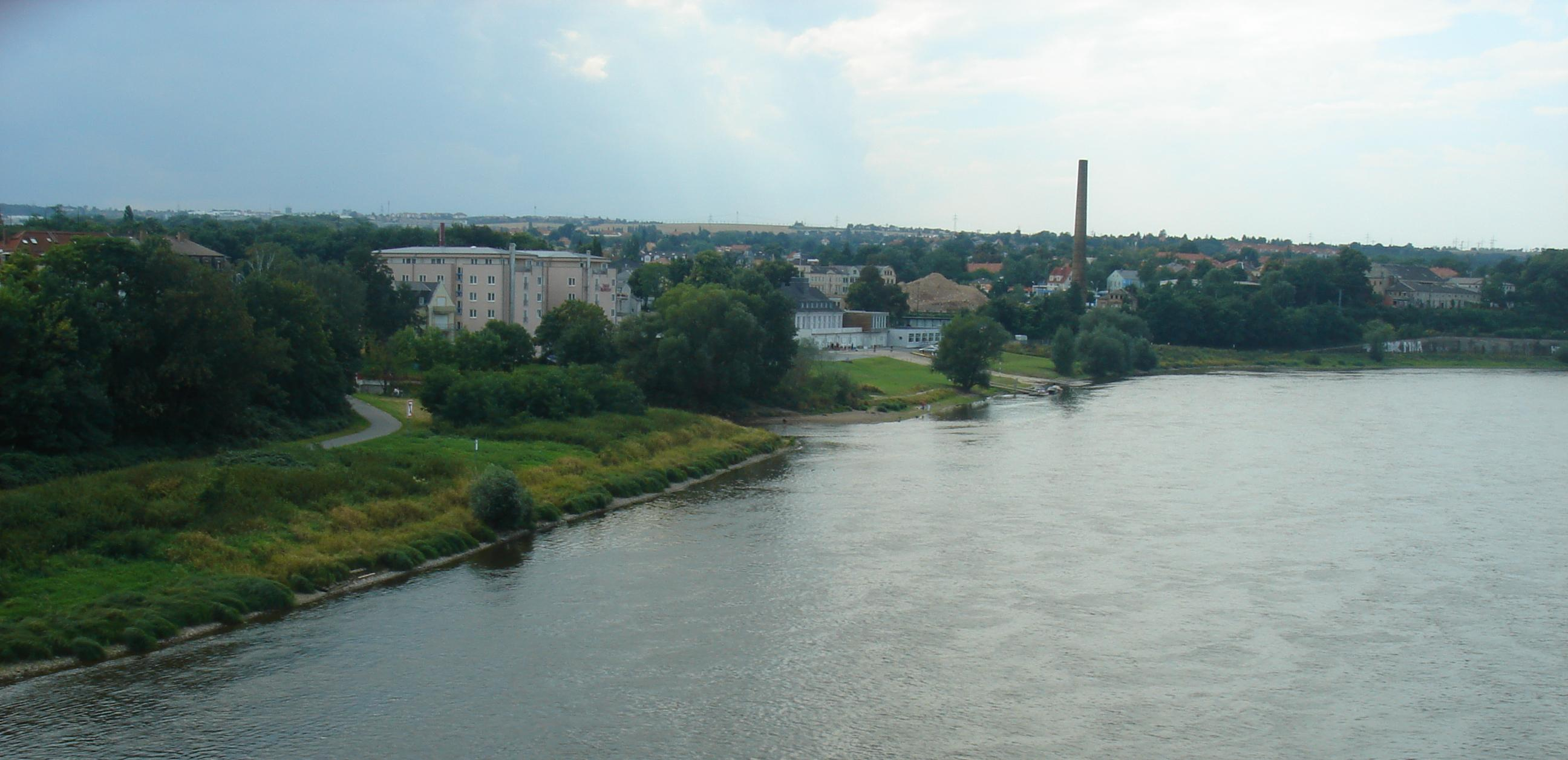 Blick von der Flügelwegbrücke über die Elbe auf Cotta; v. l. n. r.: Elbradweg, Hotel Mercure, Weißeritzmündung, Bootshaus, Trümmerberg und Schornstein des abgerissenen Hofbrauhauses, Theater Junge Generation